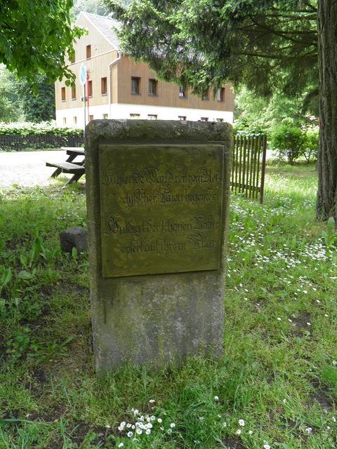 Opferstock, gewidmet dem abwesenden Freunde, Tharandt